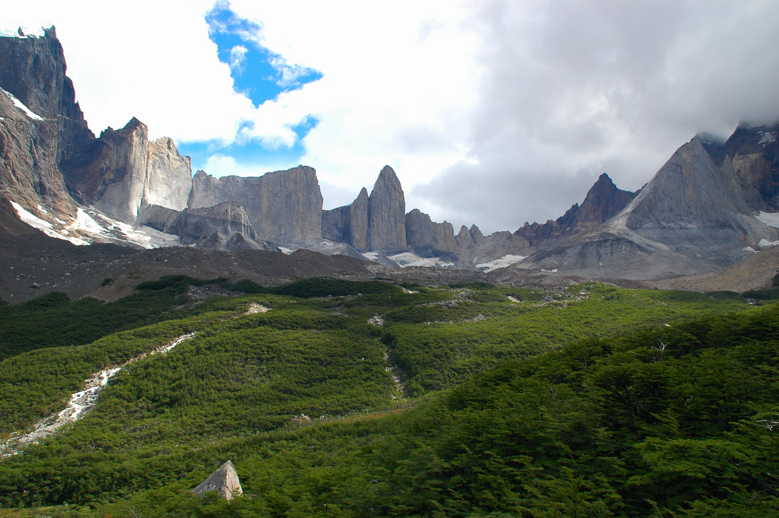 Valle del Francés, Parque Nacional Torres del Paine, Chile.